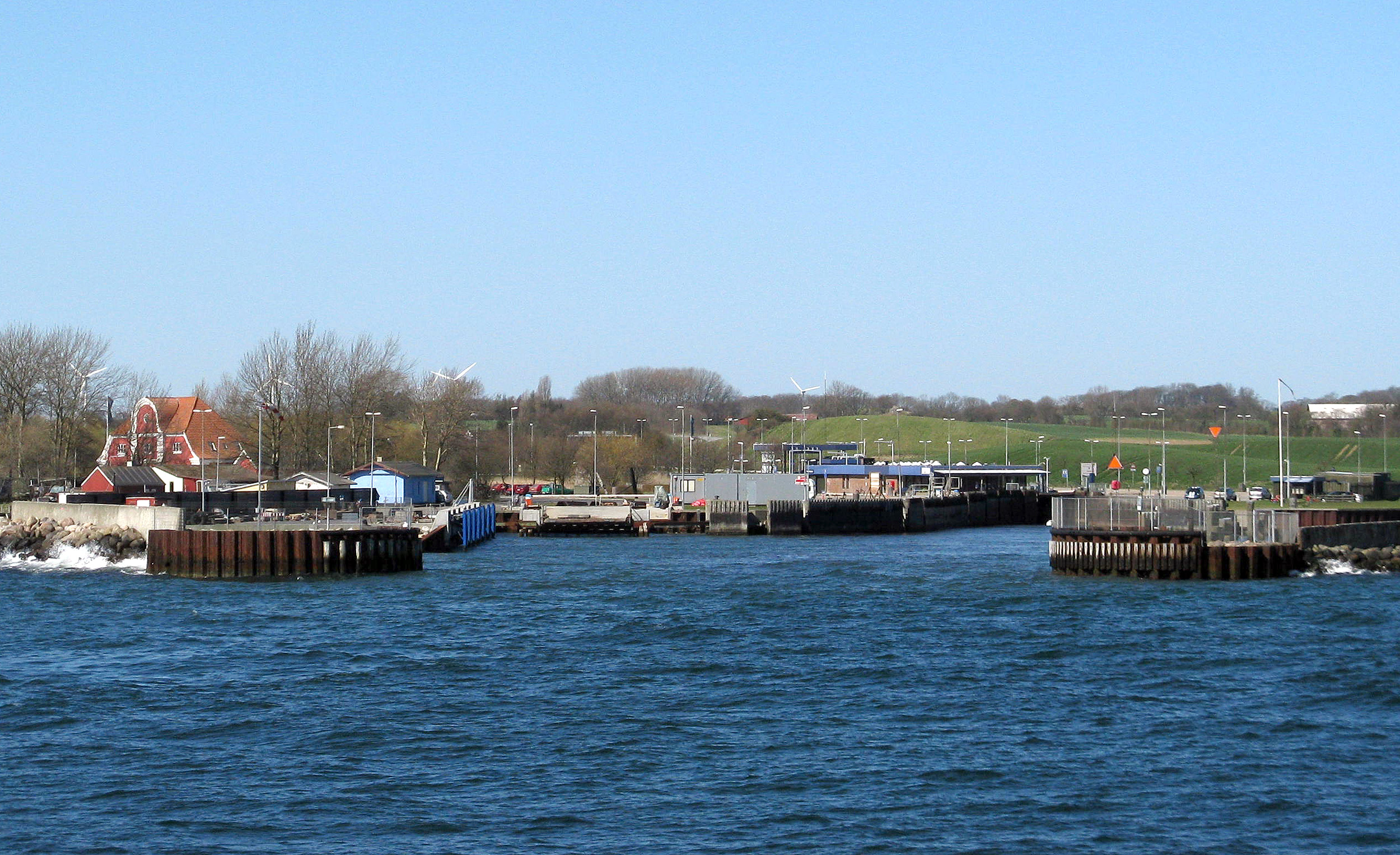 Færgelejet i Spodsbjerg.